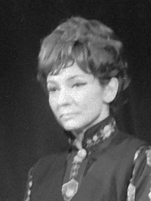 Csernus Mariann